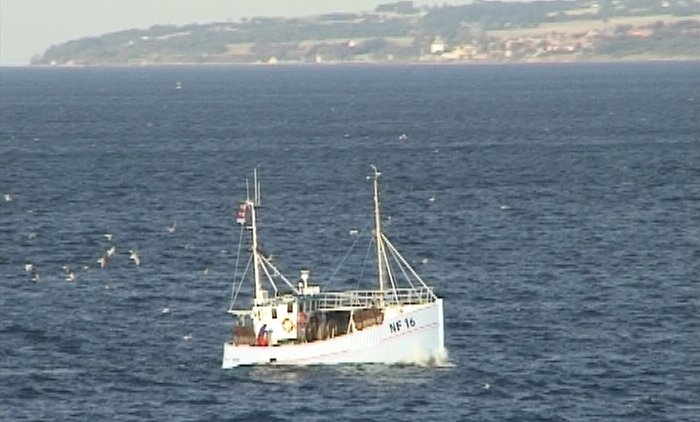 Fiskekutter. Bornholm. 2003. Fotograferet med videokamera fra færgen Rønne-Ystad.